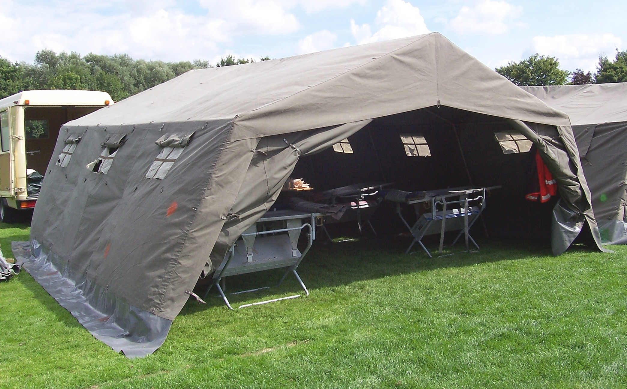 Ein SG 30 Sanitätszelt als Unfallhilfsstelle eingerichtet.